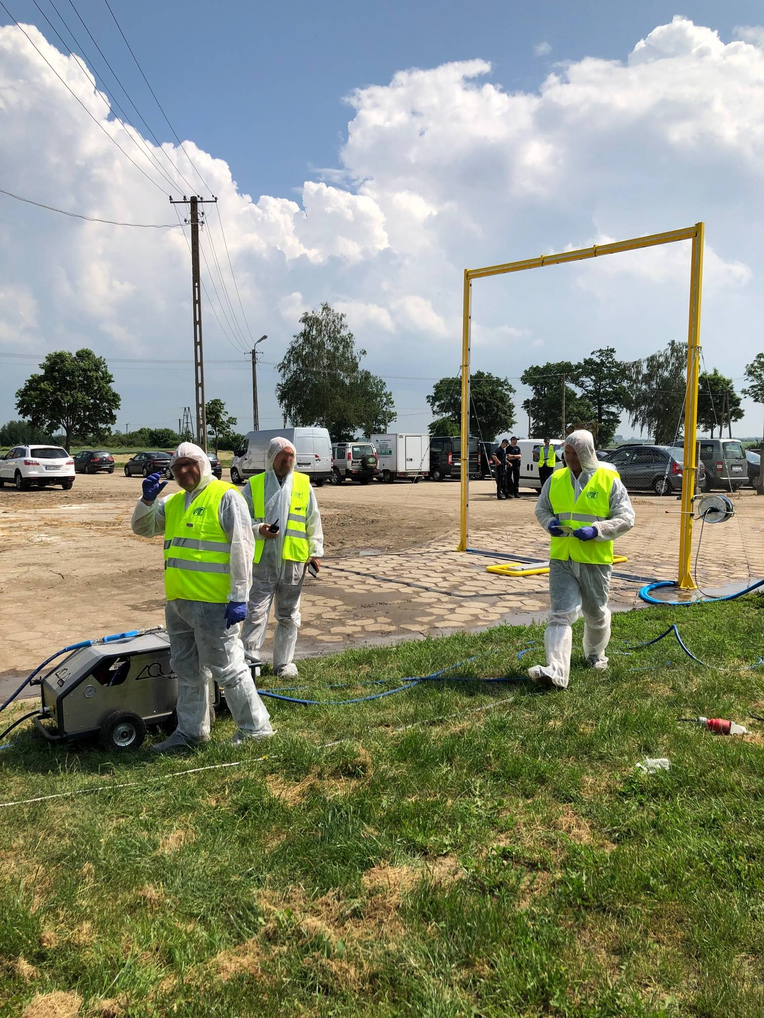 Bioasekuracja